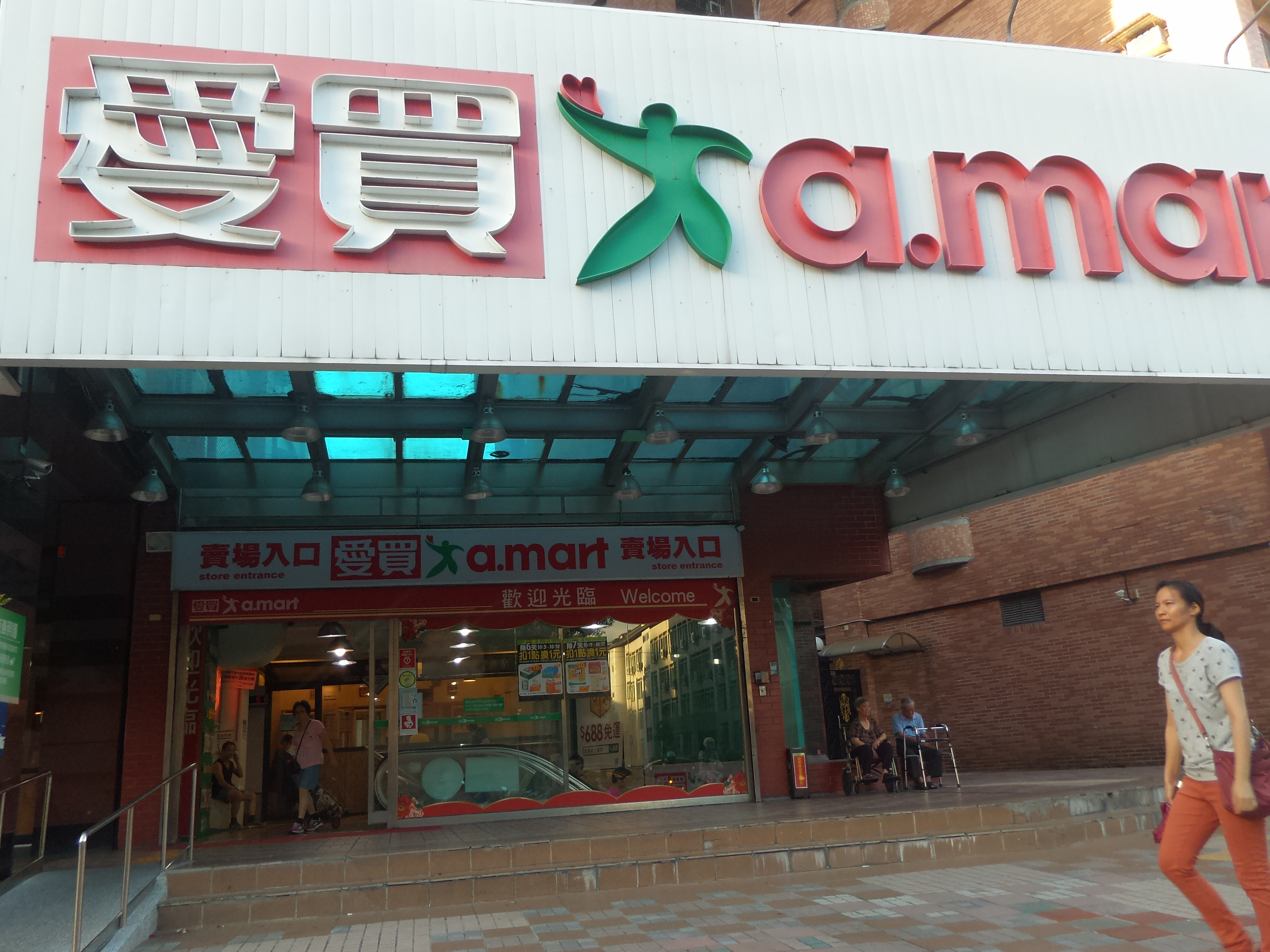 中文（台灣）: 愛買永和店